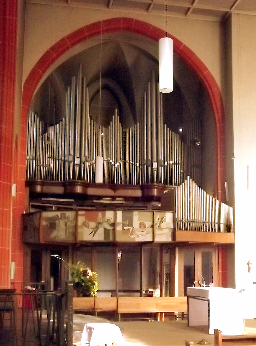 Blick durch die Kirche St. Jakob Saarbrücken in Richtung Orgel